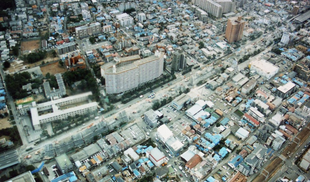 深江本町 阪神高速倒壊現場（1995年1月23日）